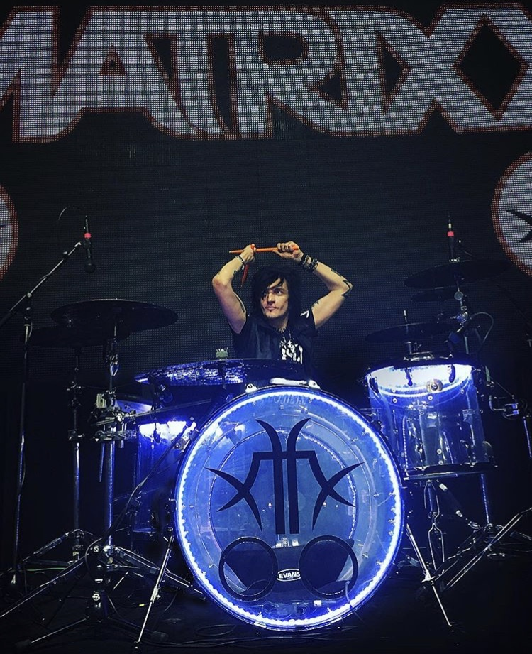 Дмитрий Хакимов (псевдоним Снэйк) — продюсер, автор песен, барабанщик, художник, бывший участник групп «Янг Ганз», «Агата Кристи», «Блондинка КсЮ». На сегодняшний момент барабанщик и директор группы «МЭD DОГ», The MATRIXX, «НАИВ», директор группы «Radio Чача».